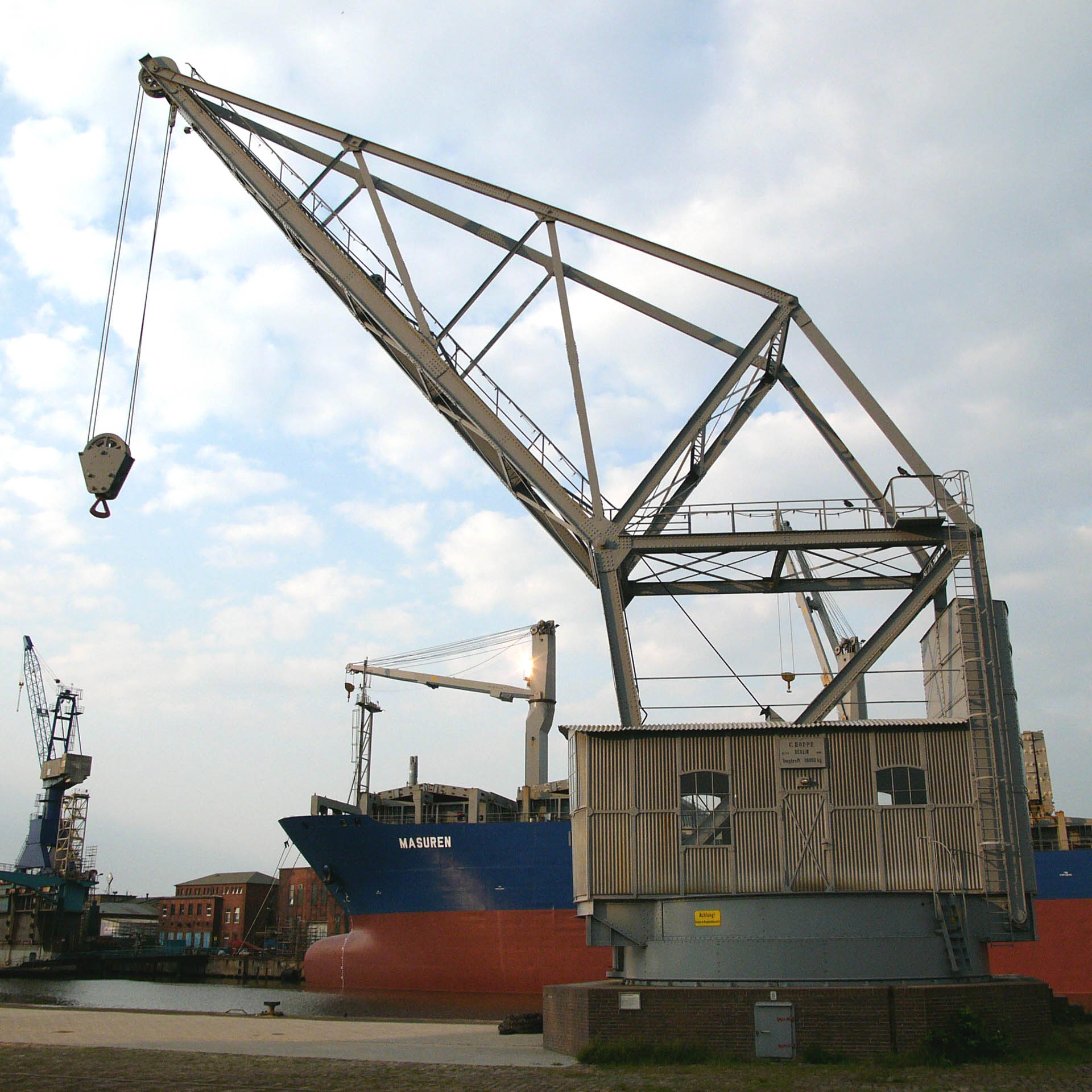 Druckwasser-Drehkran (Förderverein "Maritimer Denkmalschutz e.V." Bremerhaven) Der mit Druckwasser betriebene Hydraulikkran wurde 1899 in Betrieb genommen. Betrieben wurde der Kran von dem ca. 100 m entfernt liegenden zentralen Maschinenhaus, dem "Alten Kraftwerk". Das Kraftwerk versorgte über ein Hydraulik-Druckwasser-System die maschinellen Anlagen der ersten Kaiserschleuse und auch den Drehkran. Im Jahre 1983 wurde der Betrieb des Kranes eingestellt und steht seit dem 20. Juli 1984 unter Denkmalschutz. Nach einer Restaurierung durch die BQGB (Beschäftigungs- und Qualifizierungsges. Bremerhaven) wurde der Kran am 17. April 1998 dem Förderverein übergeben. Das abgebildete Objekt ist ein geschütztes Kulturdenkmal in der Freien Hansestadt Bremen, mit der Nr. 1554,T001 beim Landesamt für Denkmalpflege registriert.